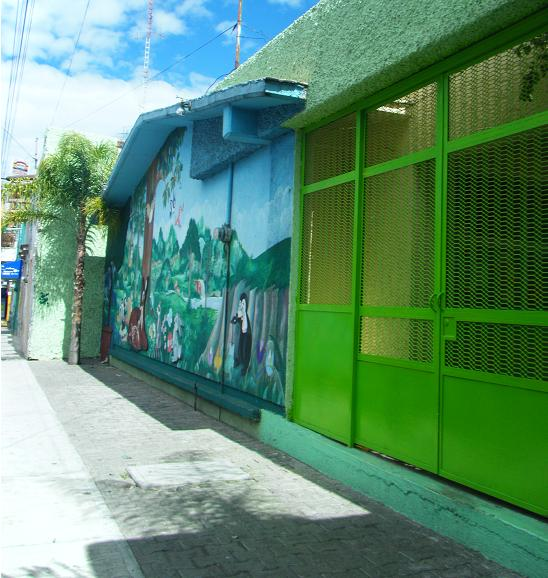 Jardín de Niños ubicado en Uriangato